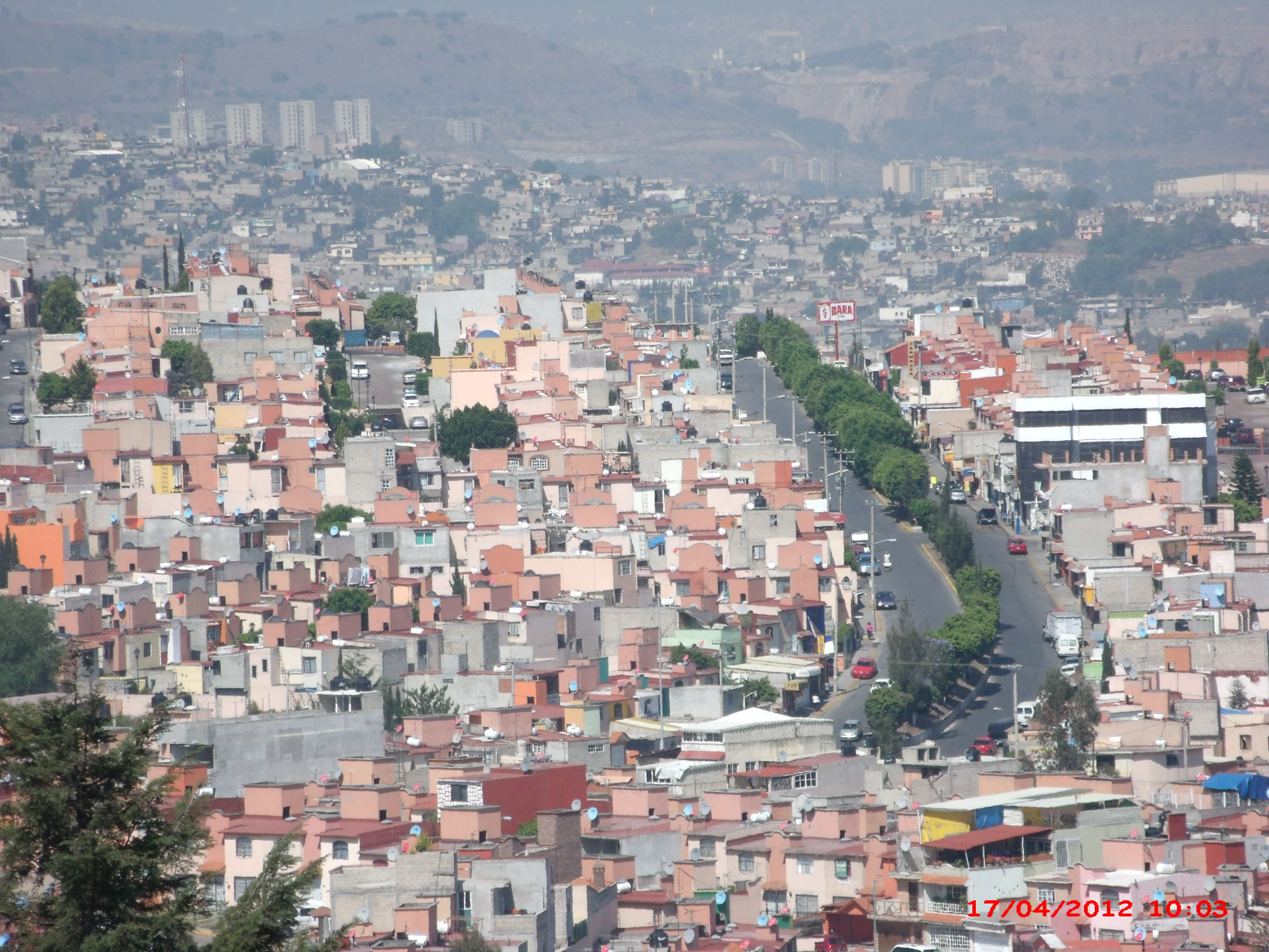 Real del bosque